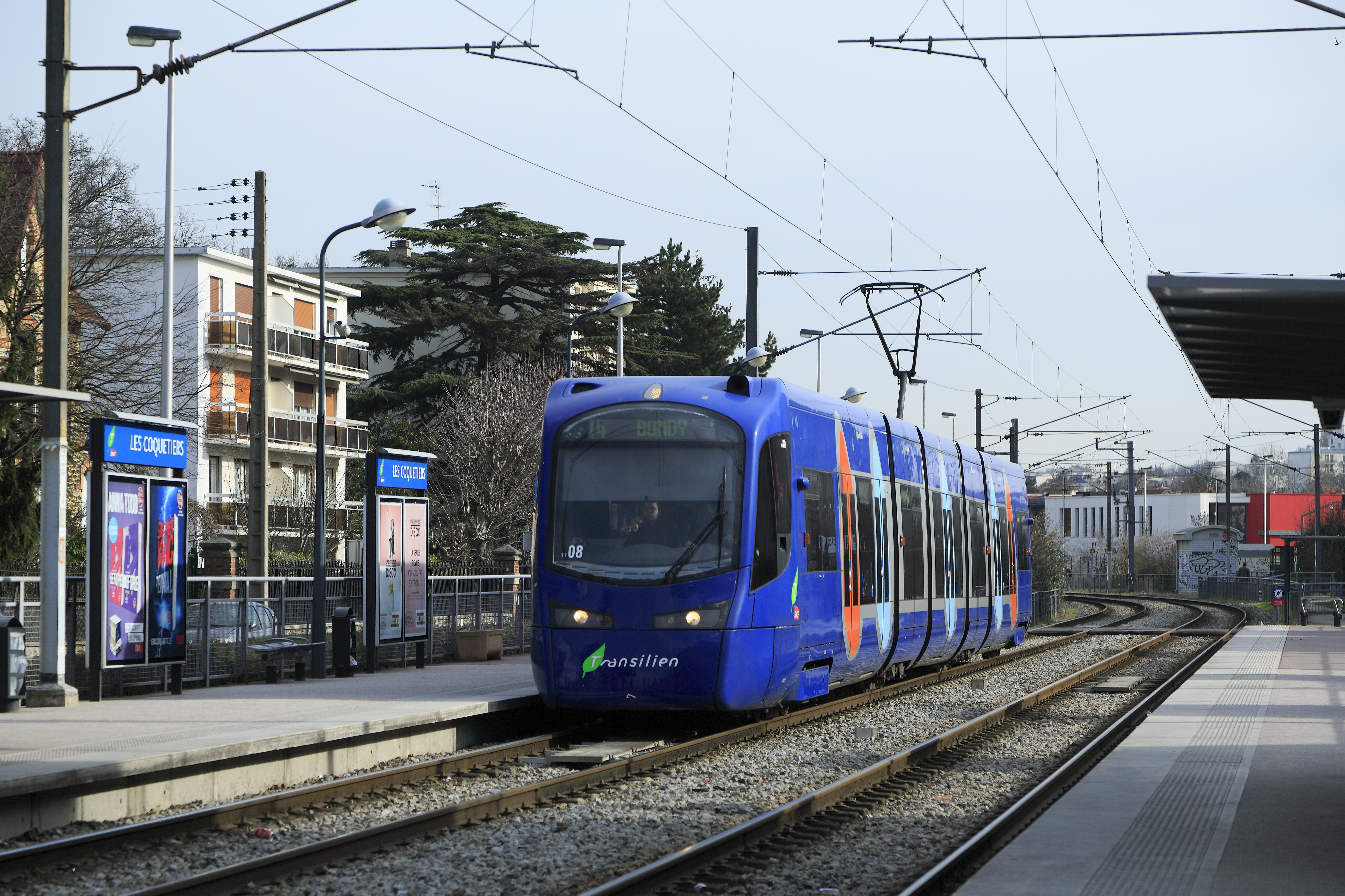 Zug der Linie T4 Aulnay-sous-Bois–Bondy, die Kettenwerksfahrleitung ist bei den Pariser Straßenbahnstrecken eine Ausnahme. Die langen Isolatoren zeigen, dass die Strecke mit der ungewöhnlich hohen Spannung von 25kV betrieben wird. Die Triebwagen der Reihe U25500 sind jedoch für die geplante Erweiterung nach Montfermeil zweisystemfähig ausgelegt, die Neubaustrecke soll wegen der Führung durch Stadtstraßen mit 750V Gleichspannung betrieben werden.